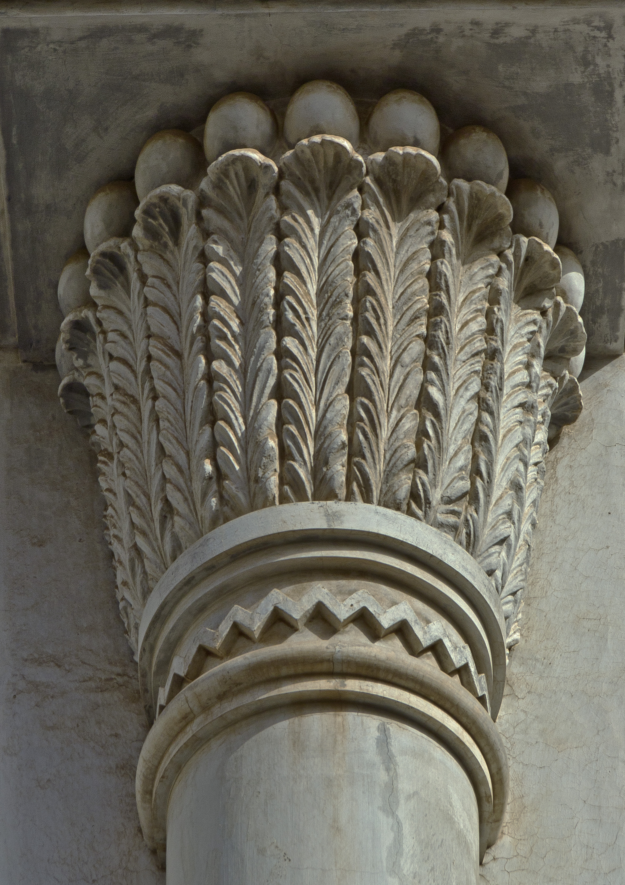 Kapitell am „Templo Masónico“ in Santa Cruz de Tenerife